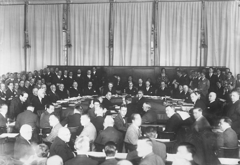 Die Tagung des Europa-Comités unter dem Vorsitz des deutschen Reichsaussenministers Dr. Curtius in Genf! Die Teilnehmer am Verhandlungstisch von links nach rechts: Matos / Schober / Zumetta / Marinkowitsch / Zaleski / Grandi / Briand / Curtius / Drummond / Henderson / Joshisawa / Leouse / Benesch und Eymans